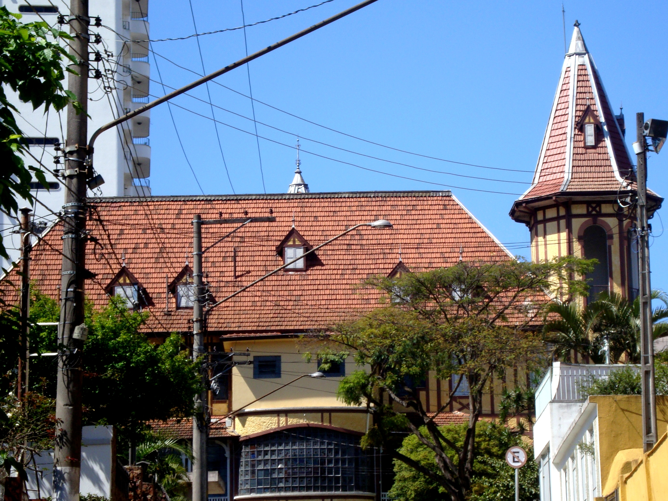 Foto do Palacete Baruel em Santana, bairro da cidade de São Paulo.